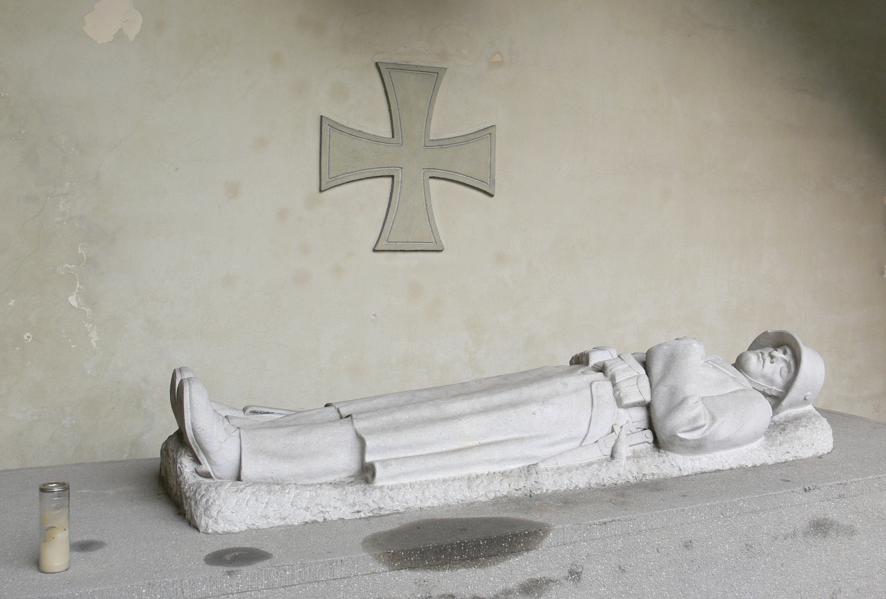 Hohenems, Kriegerdenkmal neben der Kirche St. Karl